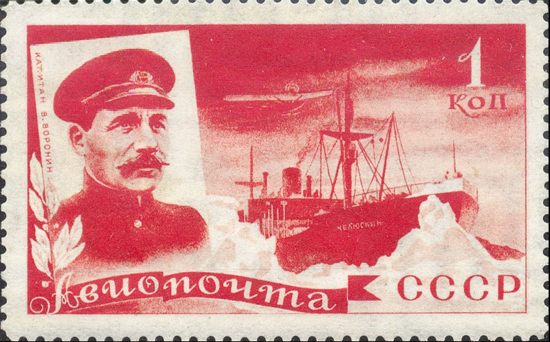 Soviet Postmark